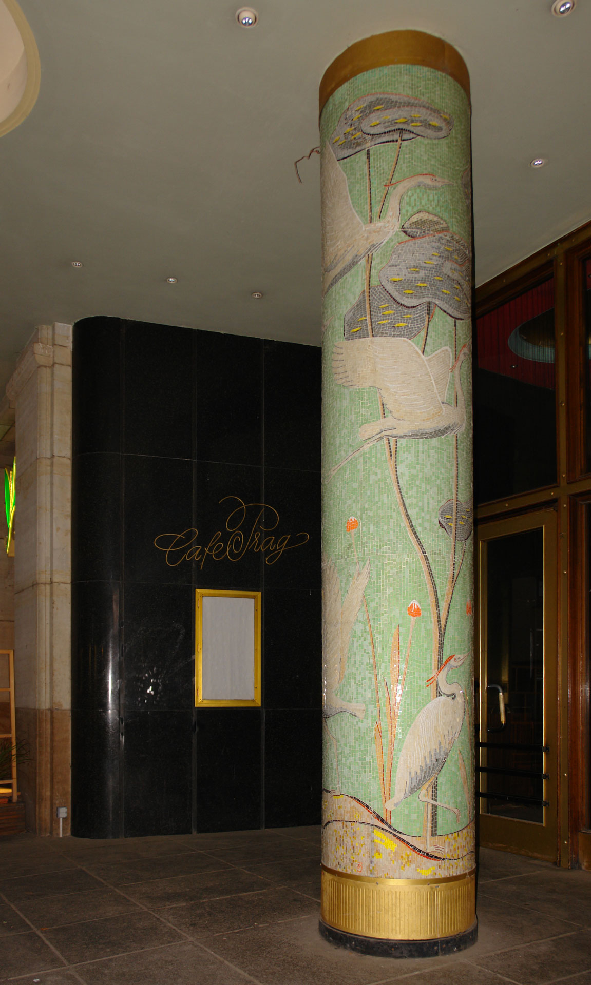 Von Johannes Beutner gestaltete Glasmosaiksäule am (ehemaligen) Café Prag am Dresdner Altmarkt